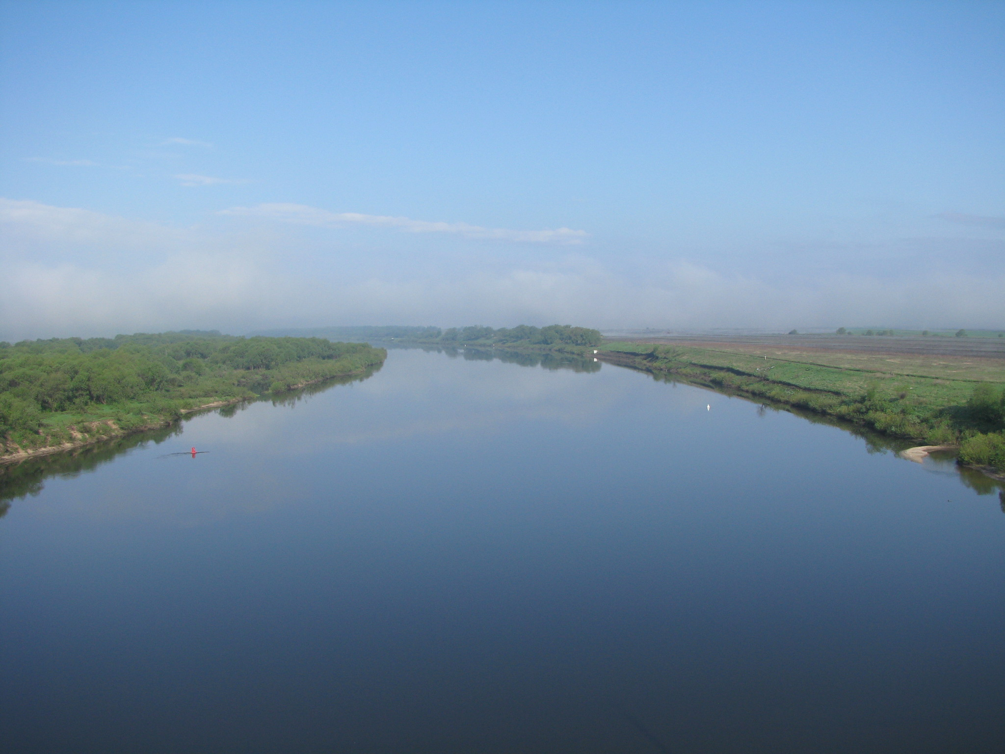 Oka river in Serpukhov District/Река Ока в Серпуховском районе